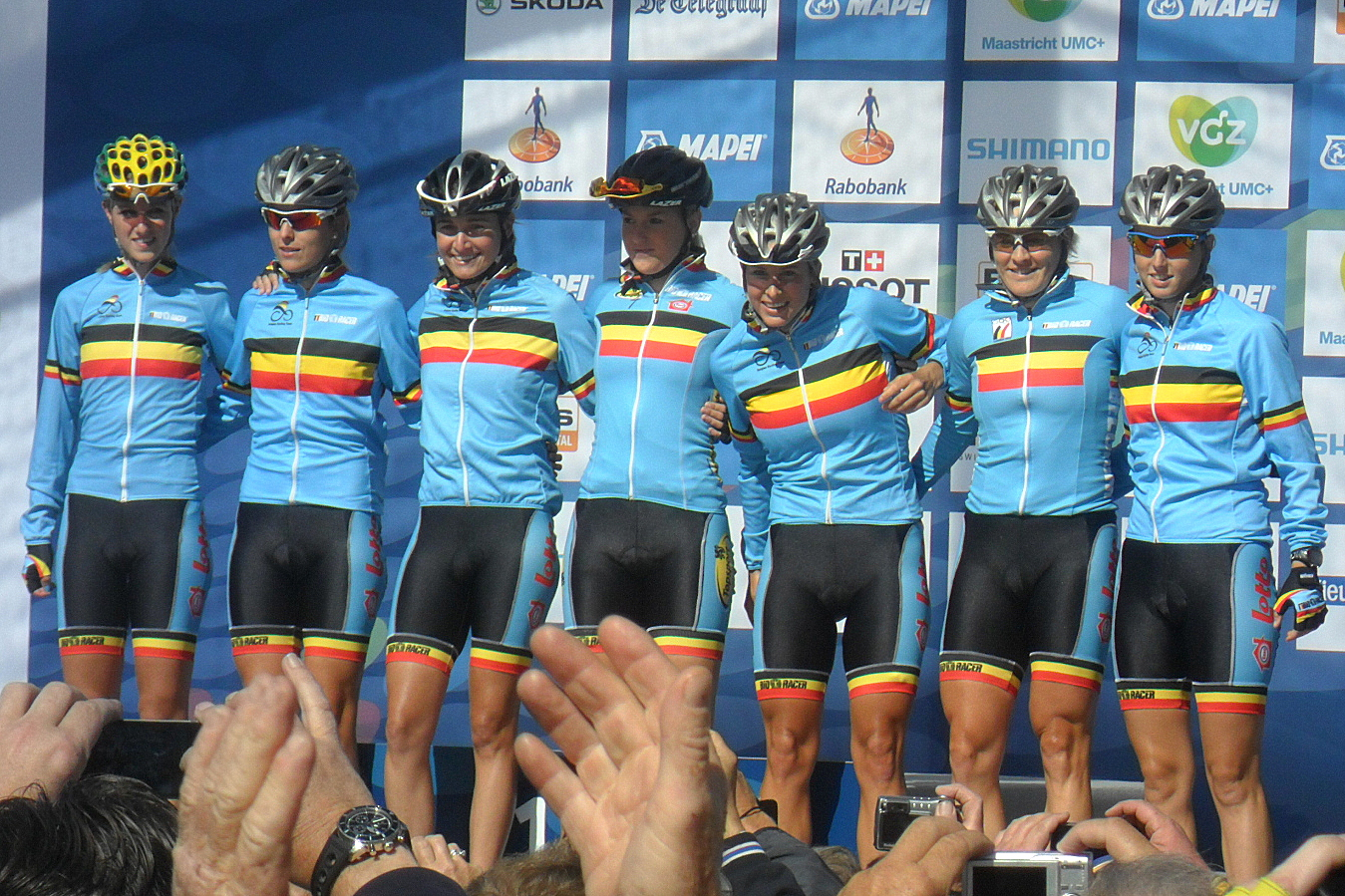 Ploegenpresentatie België voor de start van het Wereldkampioenschap 2012 in Valkenburg, Nederland.